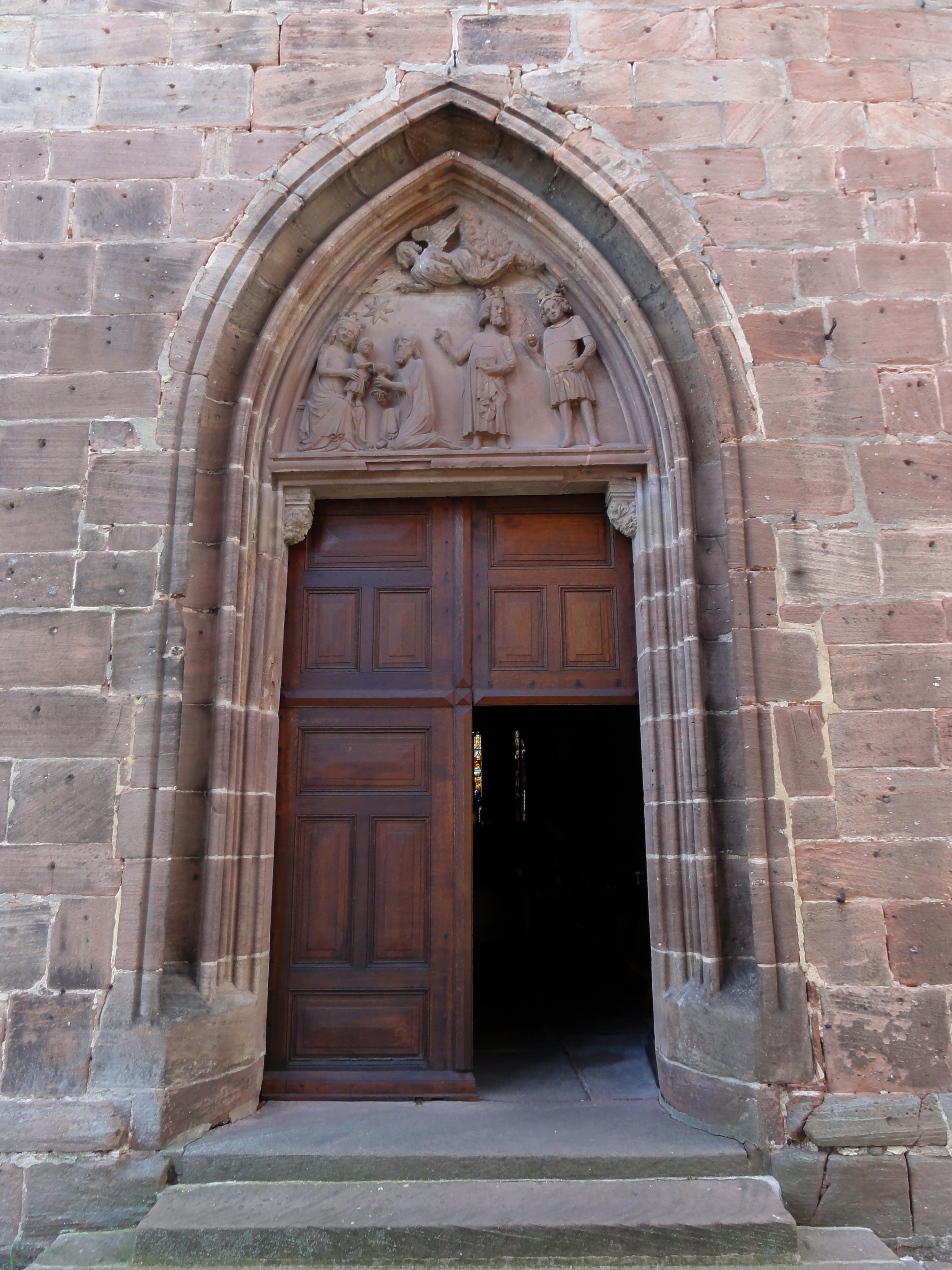 Alsace, Haut-Rhin, Bergheim, Église Notre-Dame de l’Assomption (XIVe-XVIIIe) (PA00085341, IA68006093. Tympan du portail "Adoration des Mages" (XIVe)